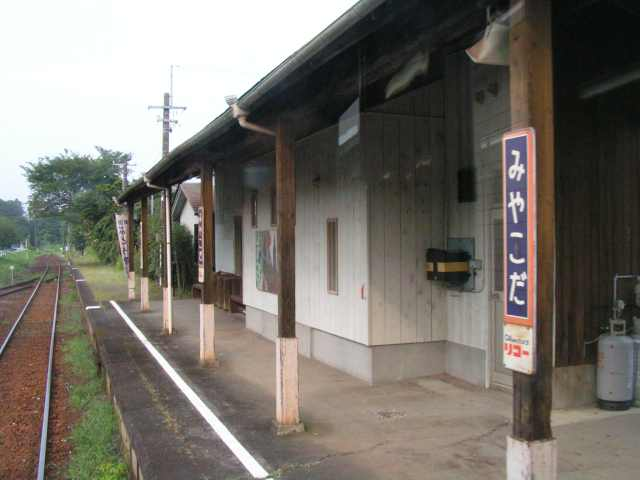 都田駅 投稿者が撮影(2006/08/11)